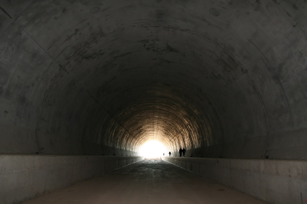 Tunnel Behringen der Schnellfahrstrecke Nürnberg–Erfurt von innen.